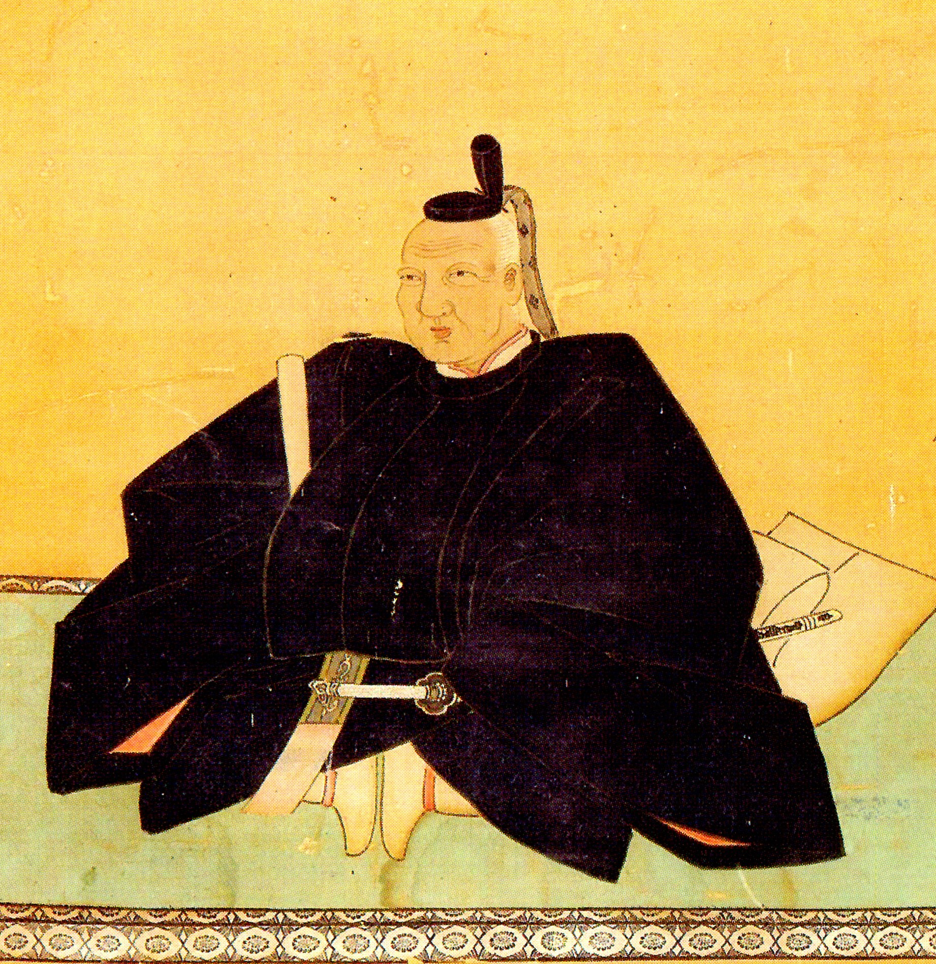 岡部長泰の肖像。